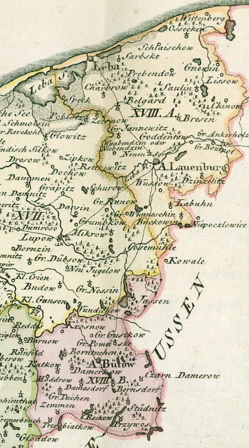 Ausschnitt aus "Landkarte des Herzogtums Vor- und Hinterpommern aus dem Jahr 1794